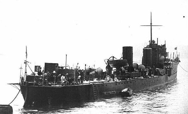 Der britische Zerstörer HMS ITCHEN der River-Klasse